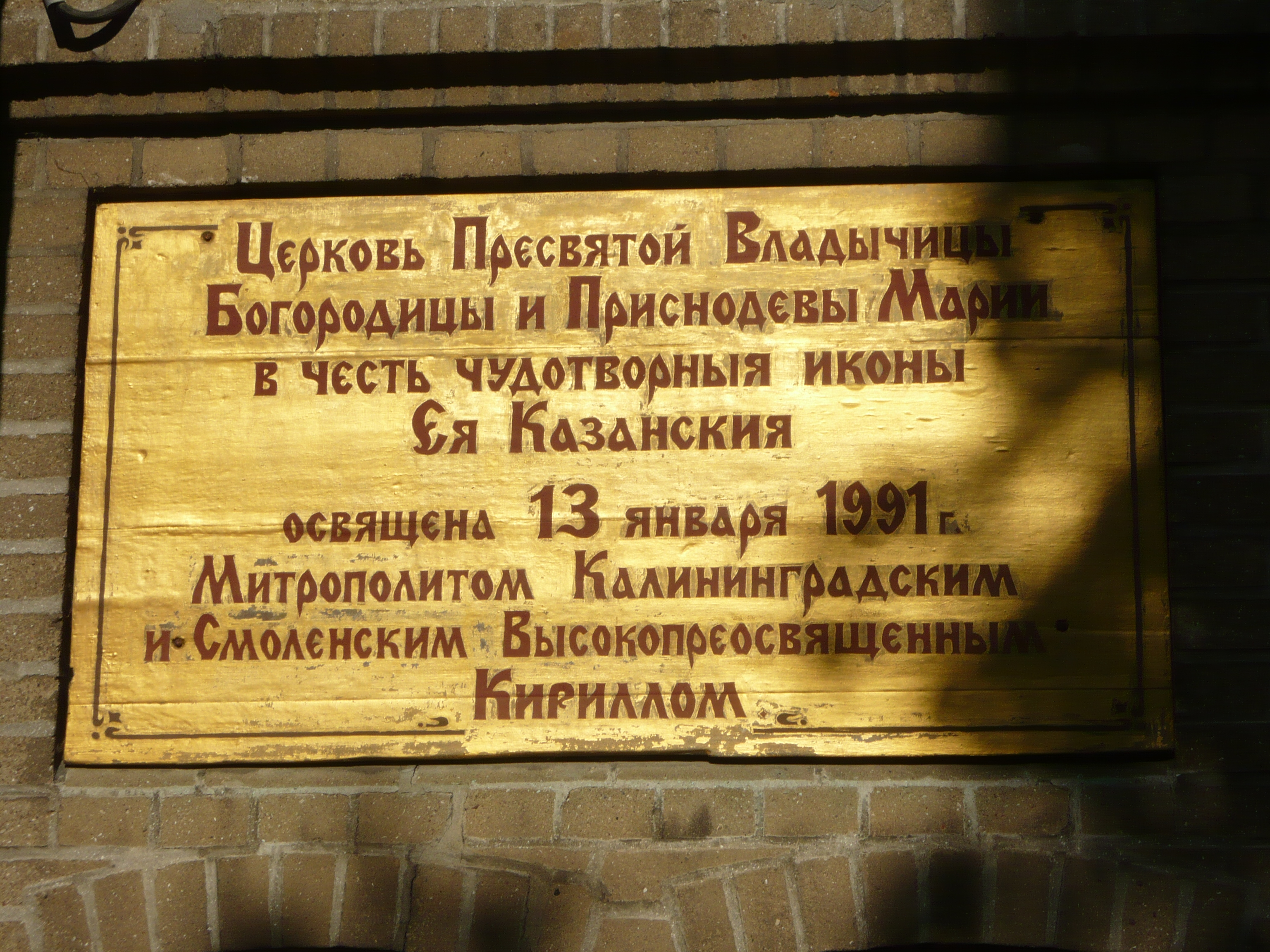 Kirchengebäude Jantarny/Palmnicken